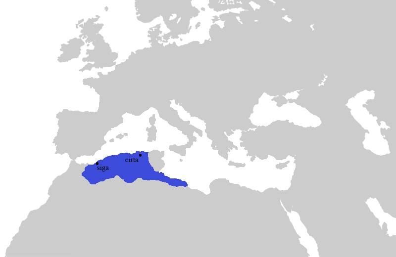 Carte du royaume numide vers 150 av. J.-C.